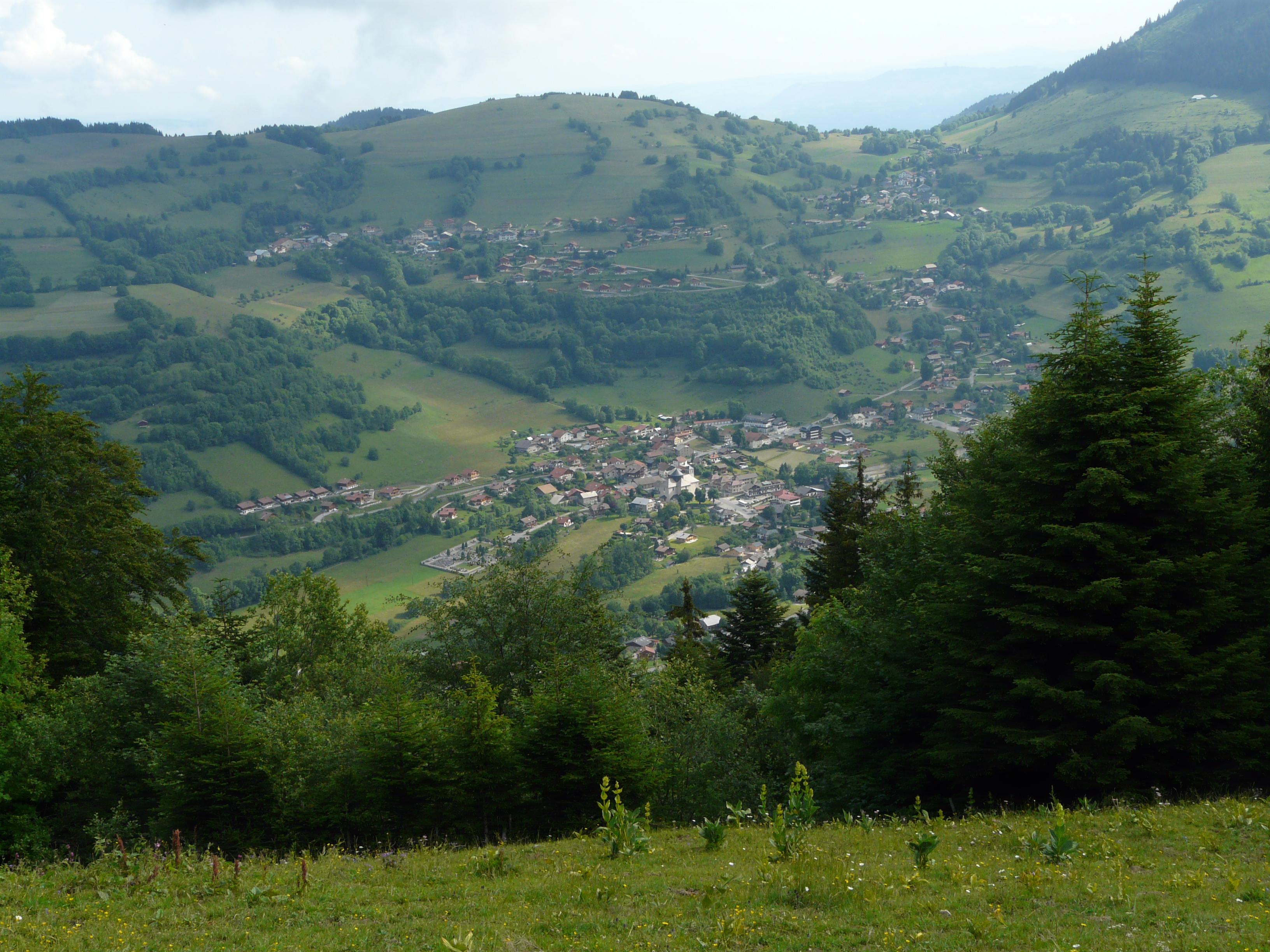 Bernex (Haute-Savoie) vu du Grand Chesnay